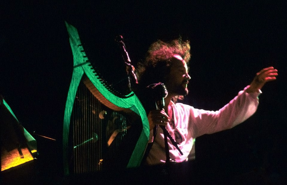 Première représentation de la Symphonie Celtique d'Alan Stivell au Stade du Moustoir à Lorient le dimanche 3 août 1980.